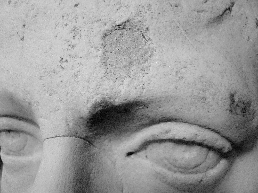 I FERITI, artistic research, Musei Vaticani, immagine fissa, Ruediger John